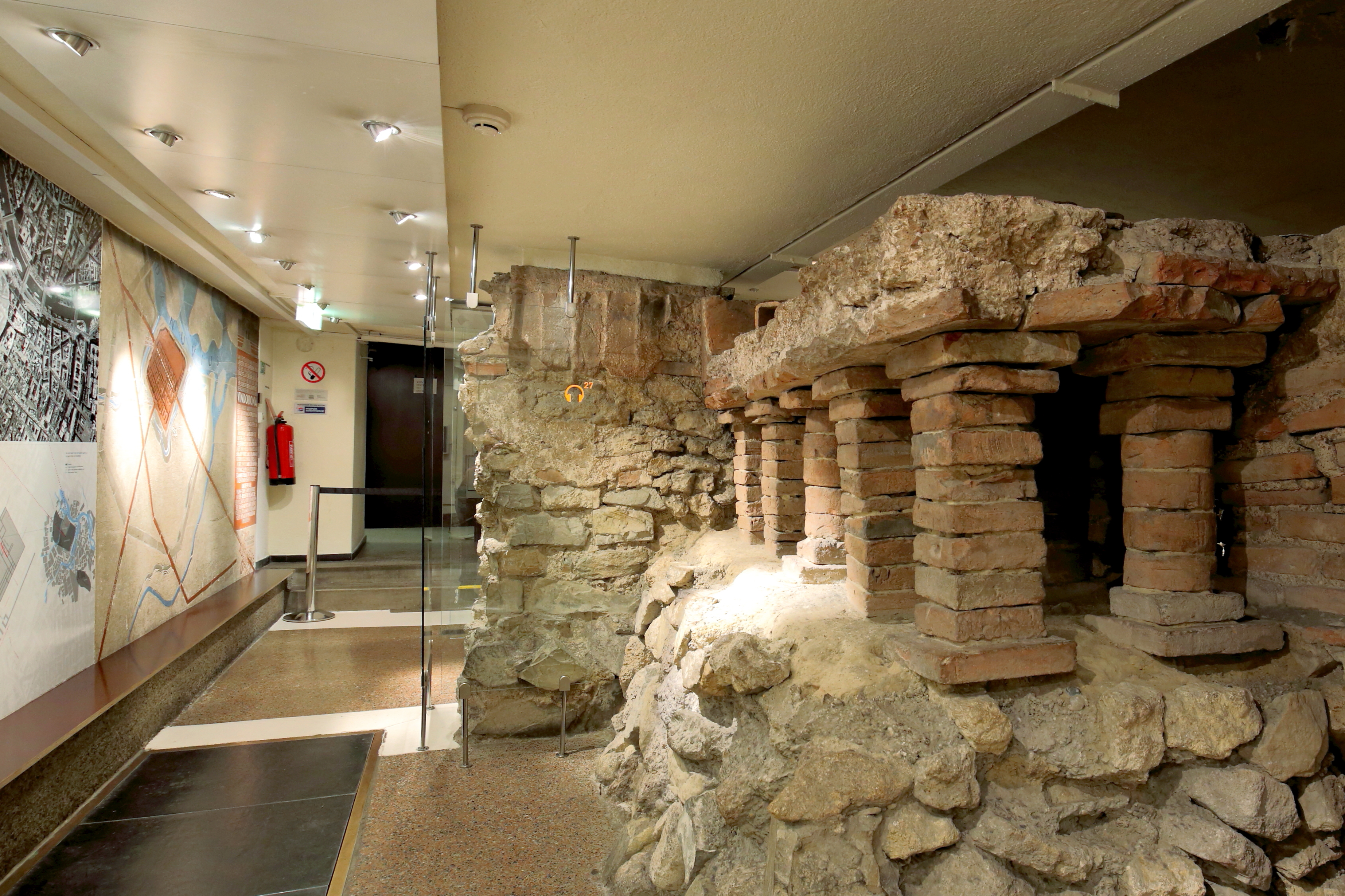 Ein Raum im Untergeschoß des Römermuseums im 1. Wiener Gemeindebezirk Innere Stadt an der Adresse Hoher Markt 3.Rechts im Bild die Bodenheizung eines Tribunenhauses.